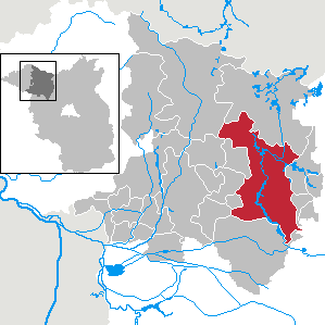 Neuruppin in Brandenburg (Country) - District Ostprignitz-Ruppin